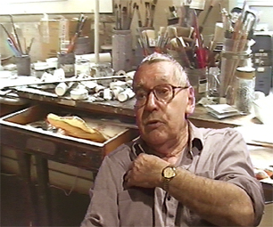 Portrait de Jean Rustin